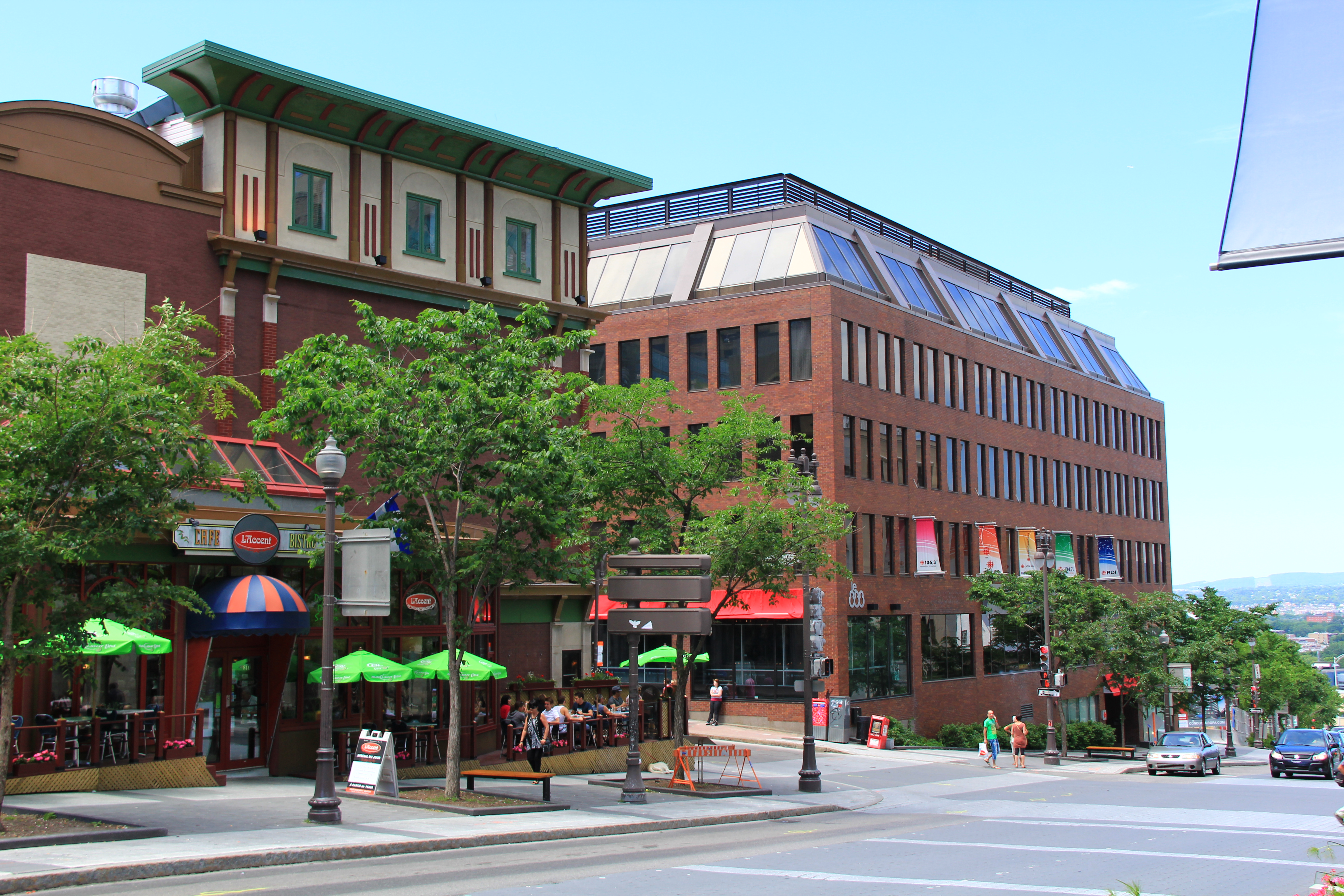 Le 888 rue Saint-Jean, à l'intersection de l'avenue Honoré-Mercier. L'édifice abrite les studios de la Société Radio-Canada à Québec.